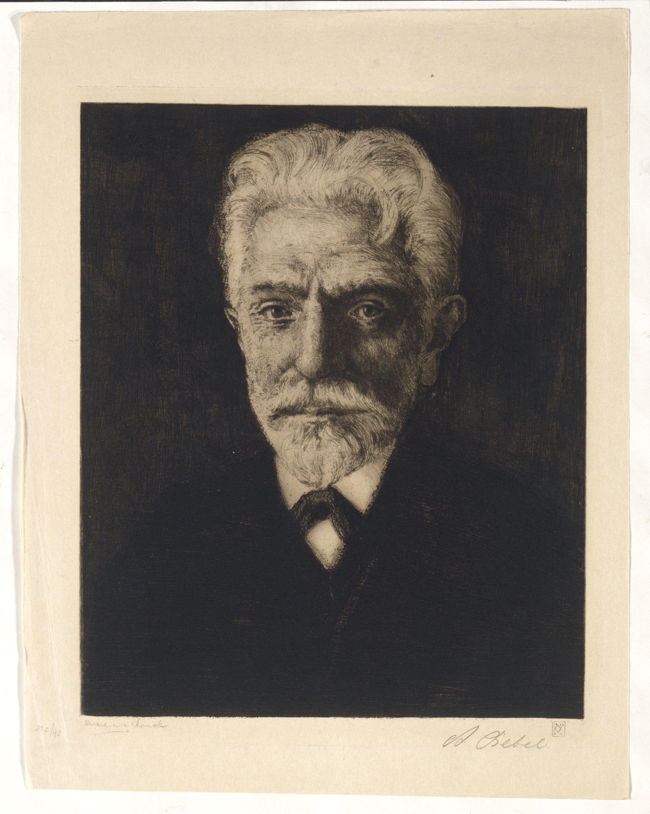 Artwork by Hermann Struck Dargestellte Person: Bebel, August (22.2.1840 - 13.8.1913), DNB-Link Datierung Display: 1904 Objektart: Vernis mou, Radierung Schlagworte Inhalt /Geografie: Mann, Porträt Schlagworte Kontext: Politiker, Sozialdemokrat